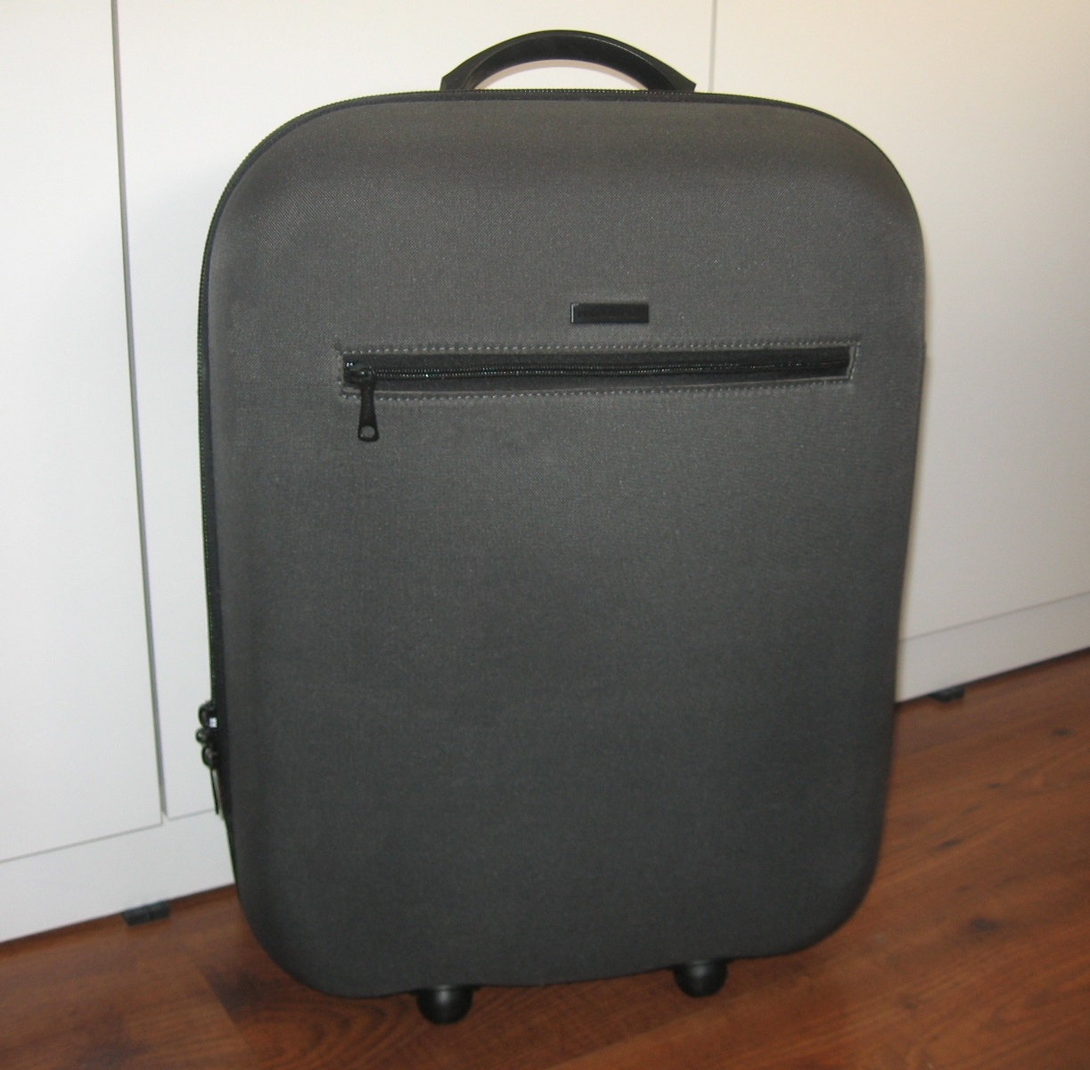 Maleta semirrígida